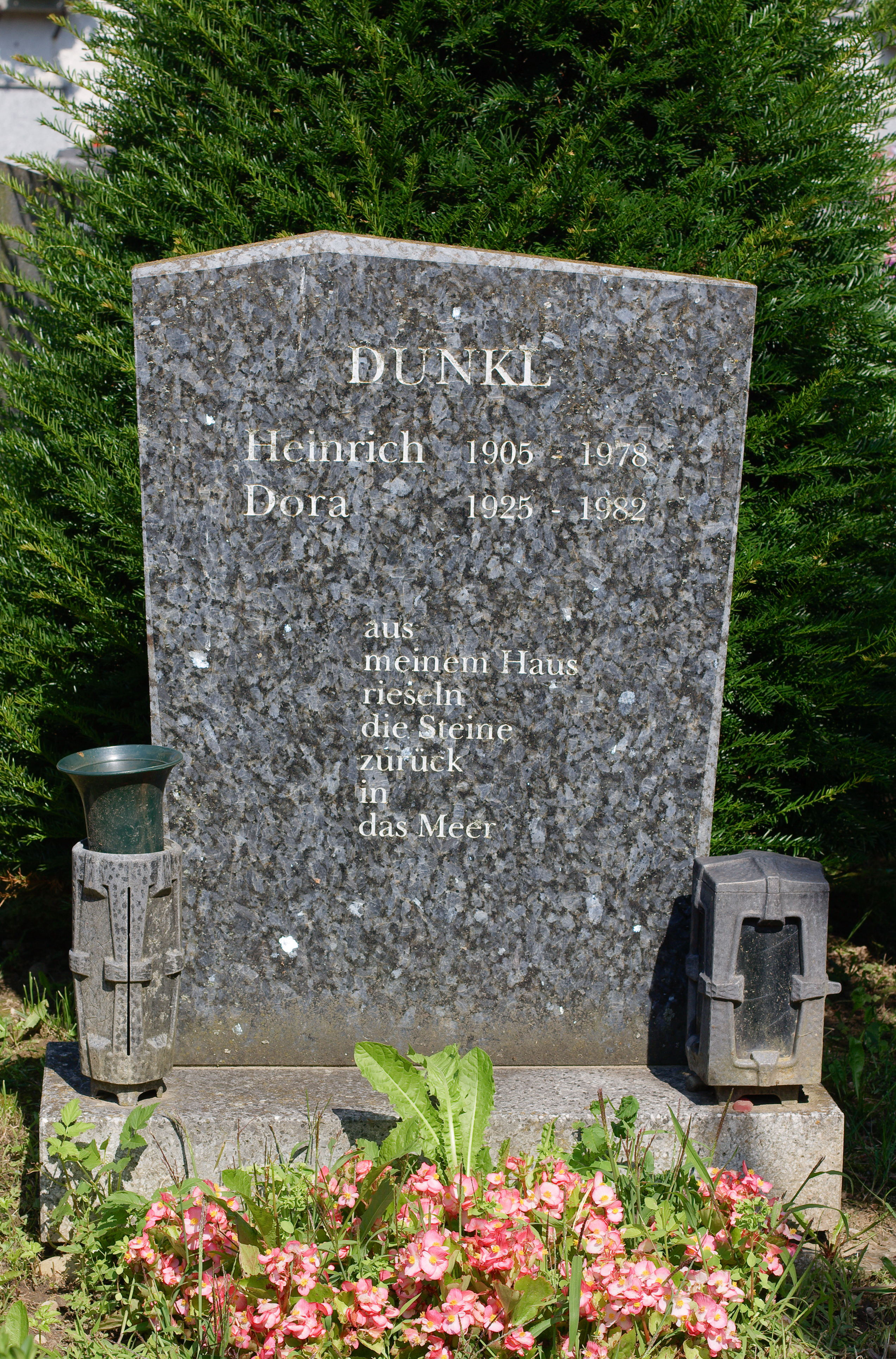 Das Grab von Heinrich und Dora Dunkl am Steyrer Urnenfriedhof (Tabor). Der Grabspruch stammt aus Dora Dunkls Gedichtzyklus Mein Haus[1]